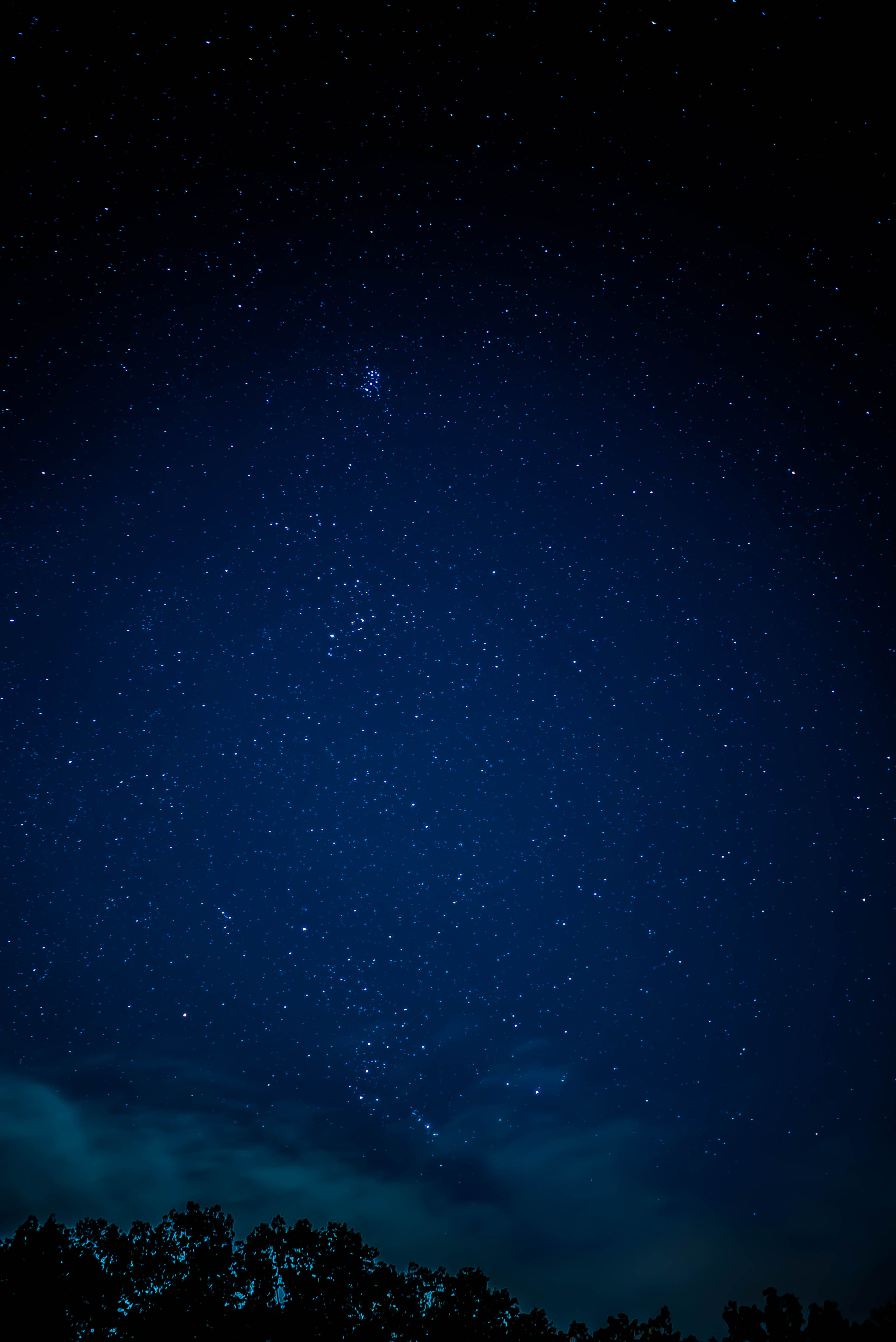 秩父ミューズパーク駐車場で撮影しました。